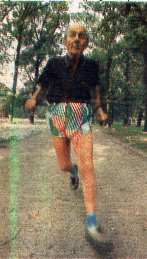 Antoni Szymański (ur. 1904) podczas III Biegu Solidarności we Wrocławiu (1991)